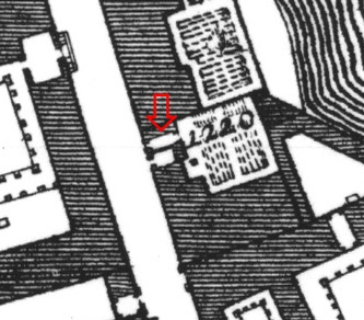 Pianta di Nolli